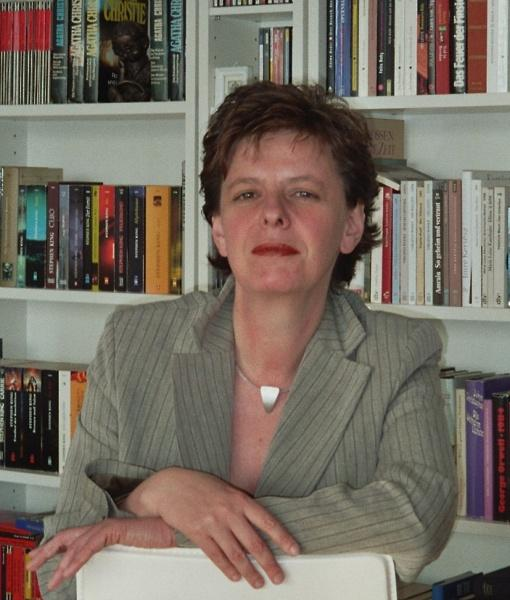 Portrait Kerstin Rech